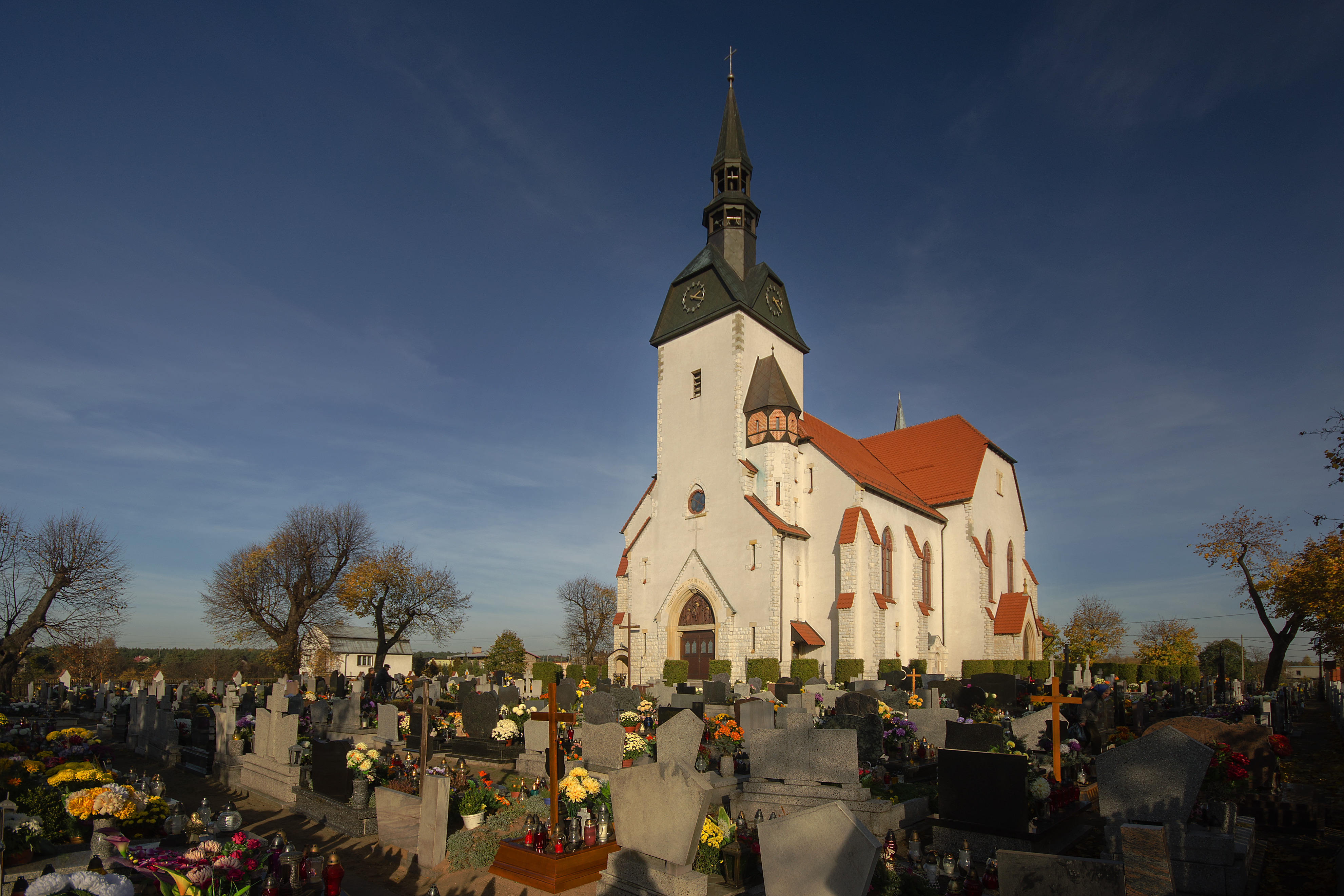 Kościół św. Anny w Dziergowicach, gm. Bierawa, pow. kędzierzyńsko-kozielski, woj. opolskie